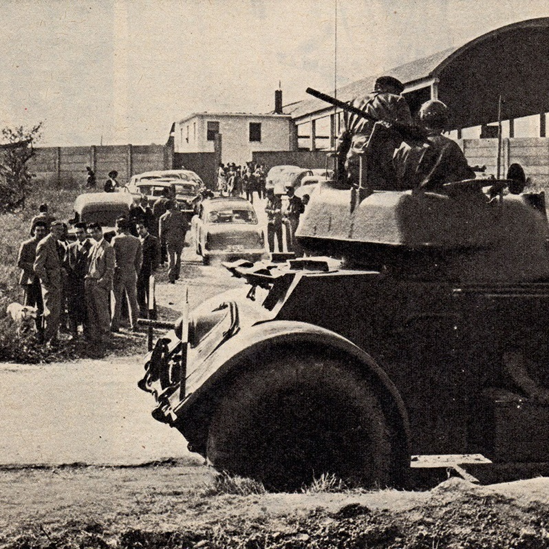 Un autoblindo dei Carabinieri davanti al capannone di Rovereta (San Marino) in via dei Censiti, sede del governo provvisorio sammarinese nell'ottobre 1957. La foto è stata scattata vicino al confine italo-samamrinese alle seguenti ccordinate Object location43° 59′ 25.4″ N, 12° 30′ 54.7″ E